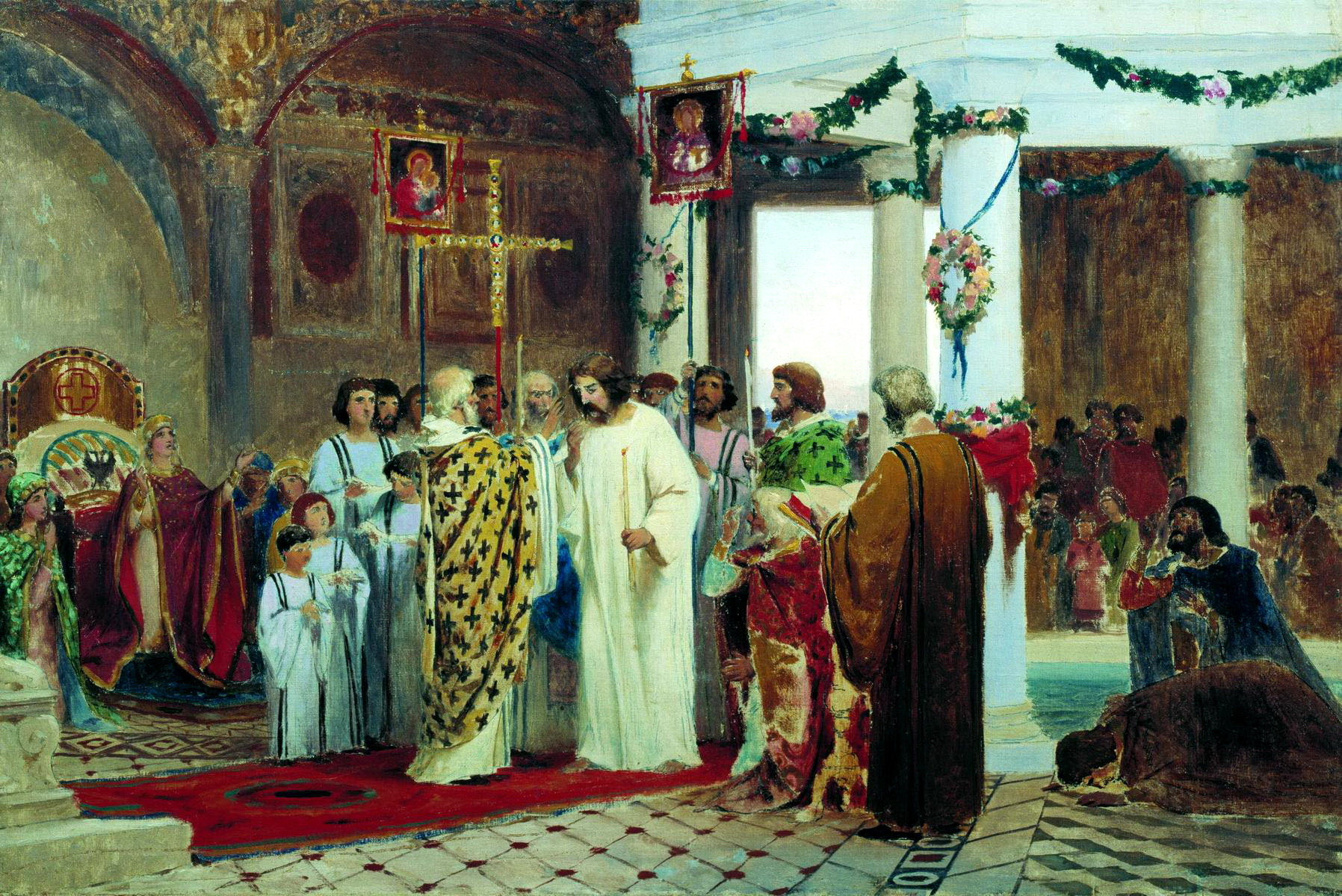 БРОННИКОВ Фёдор - Крещение князя Владимира